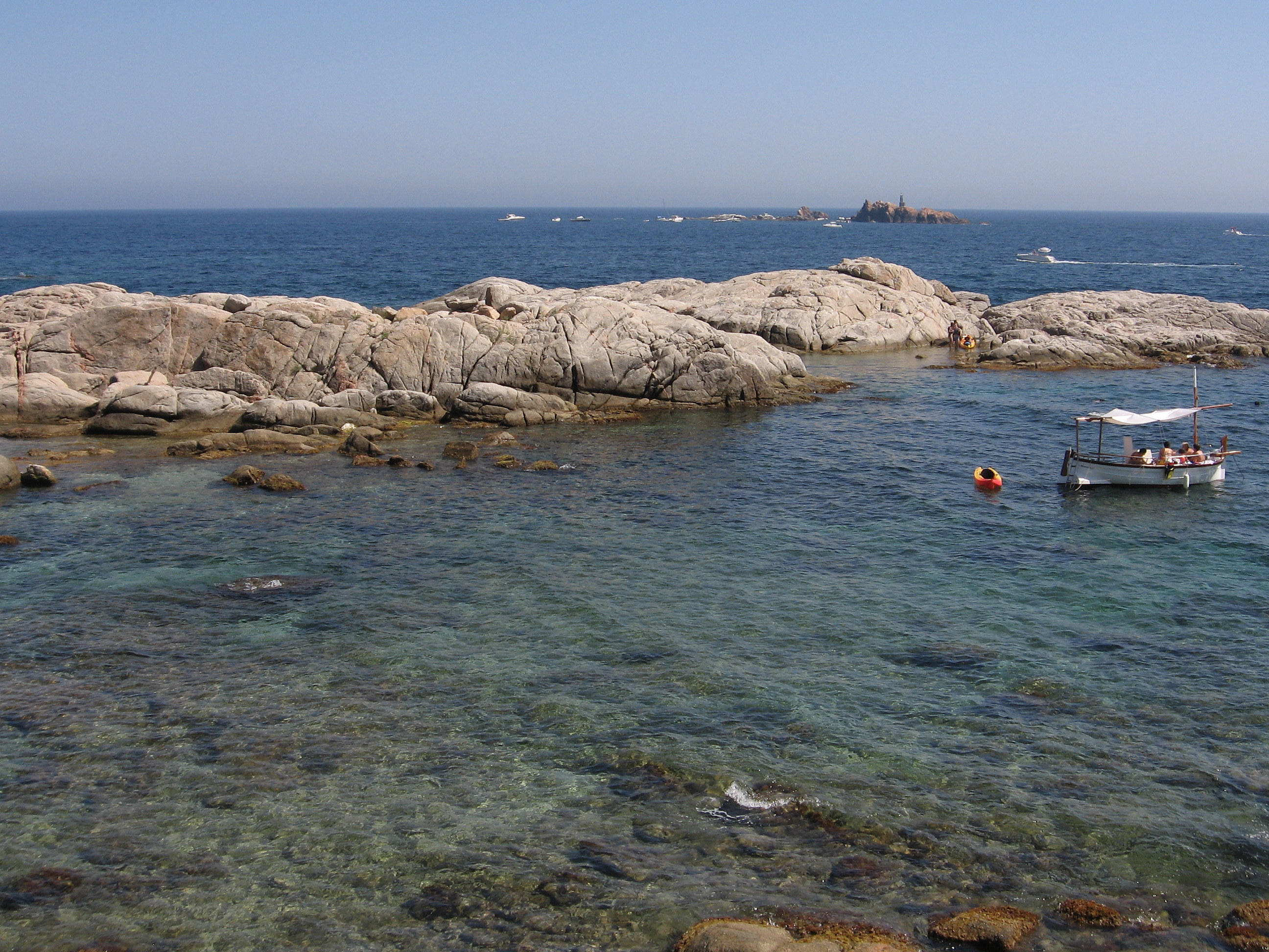 Cap de Planes i Illes Formigues (Girona)